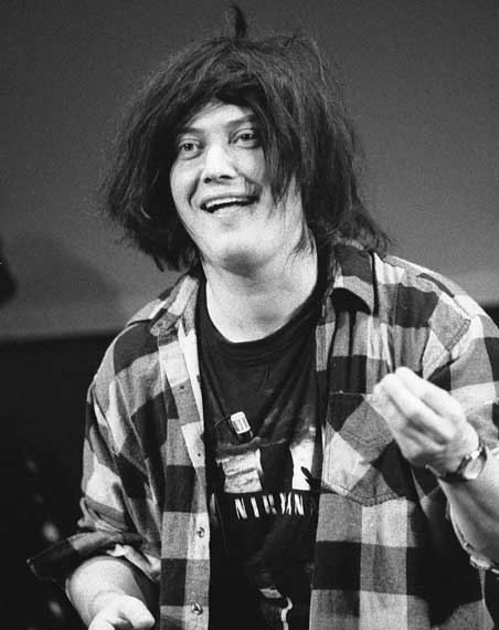 Foto di Lorenzo, personaggio di Corrado Guzzanti